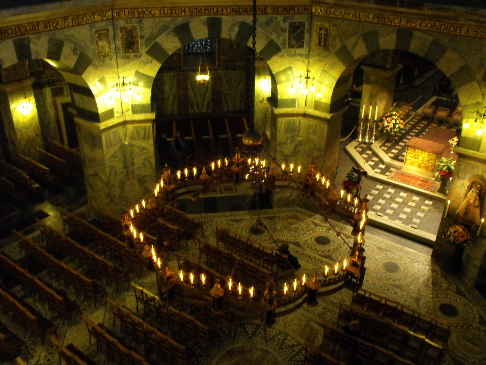 Illuminierter Barbarossaleuchter im Aachener Dom